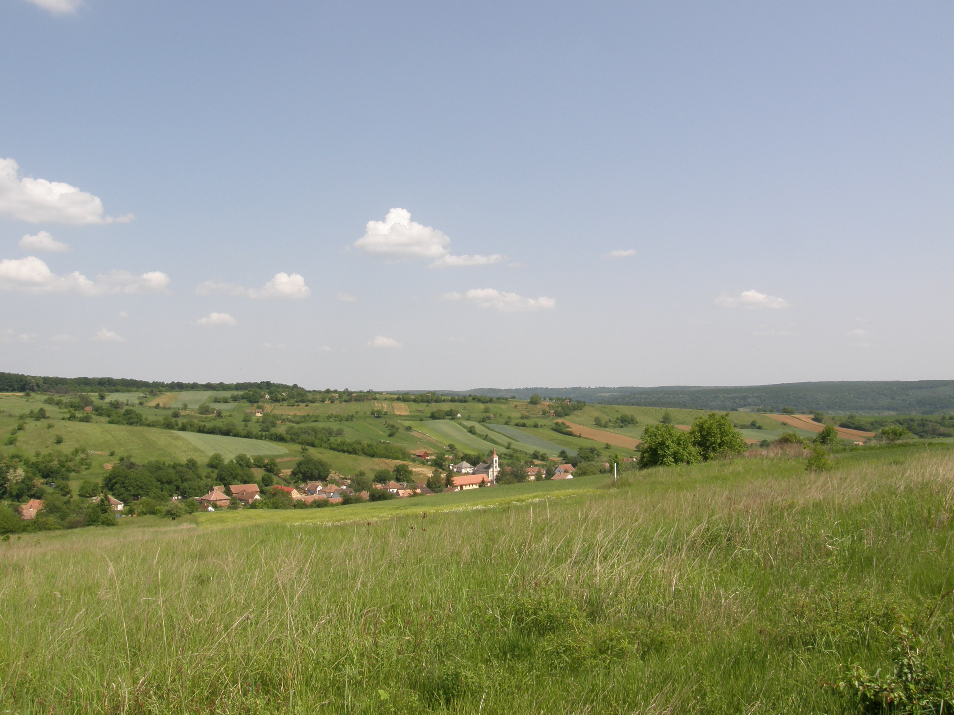 Somogyi falú